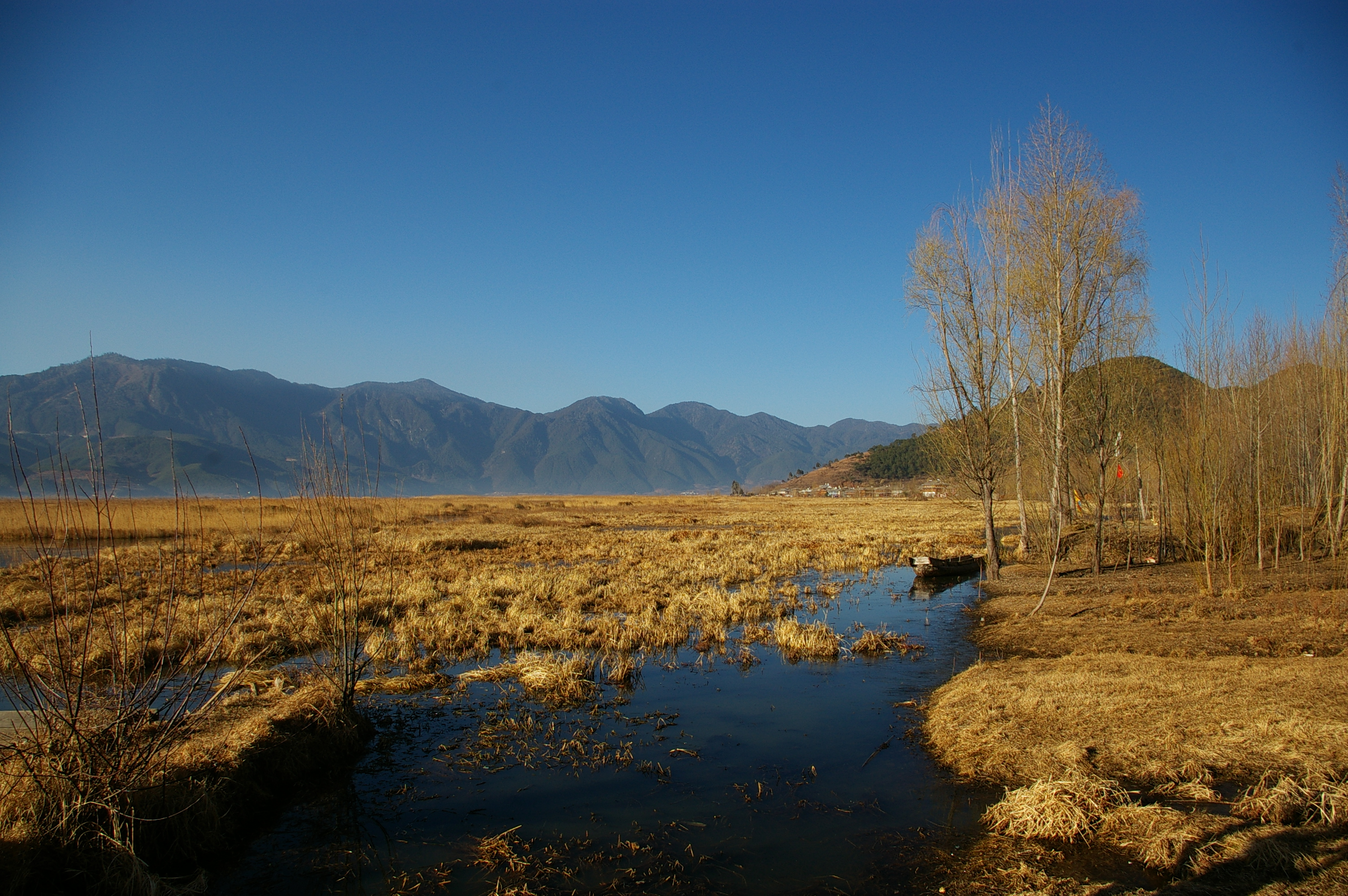 泸沽湖草海Lugu Lake